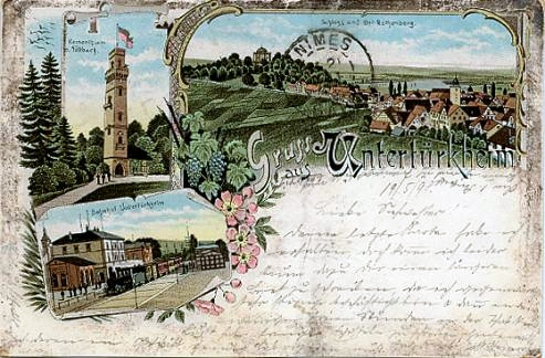 (Stuttgart-)Untertürkheim mit Bahnhof und Kernenturm sowie Kaltenleutgebnerbahn (Ansichtskarte)